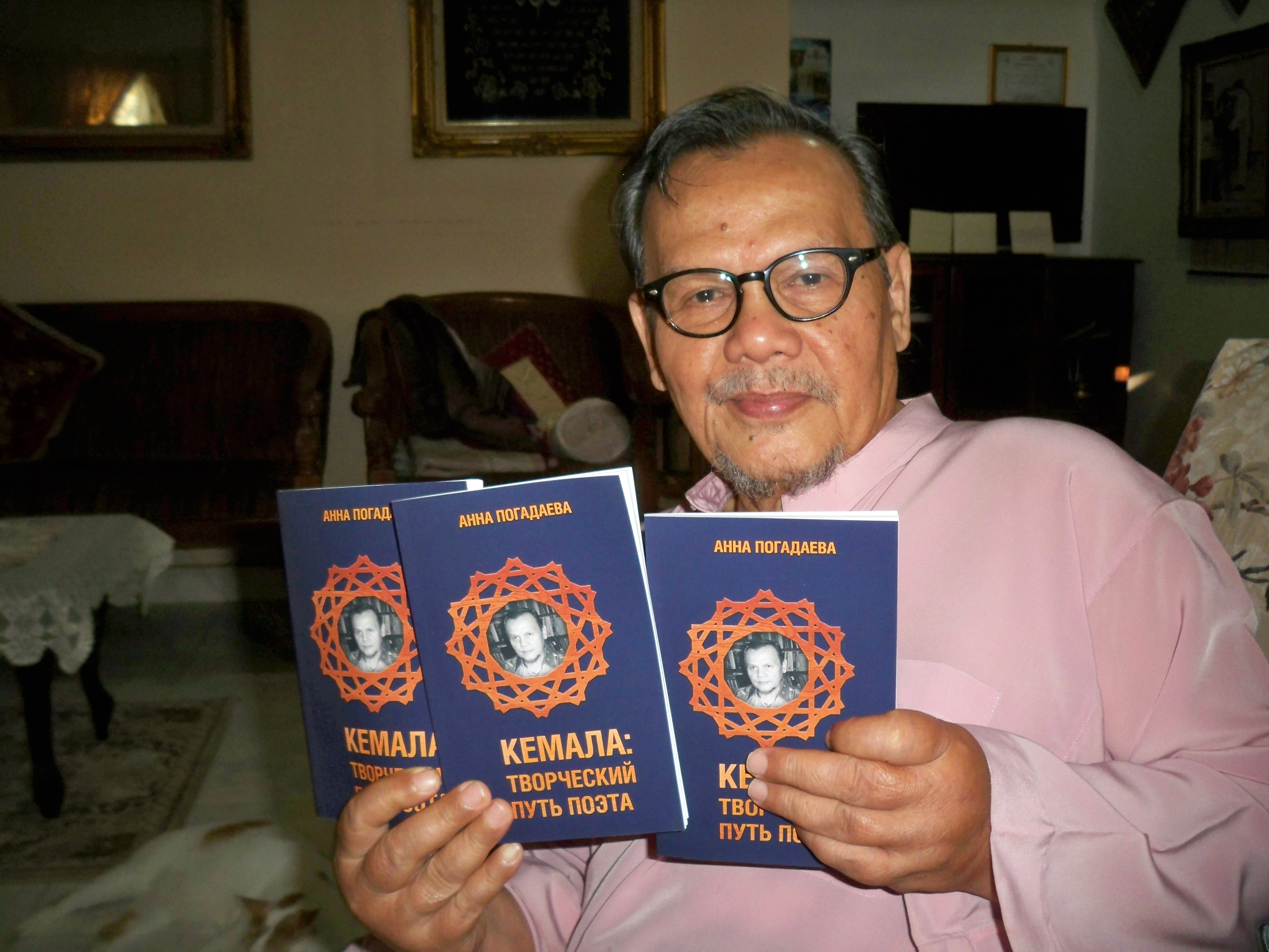 Kemala dengan buku tentang kreativitinya oleh Anna Pogadaeva yang diterbitkan di Rusia pada tahun 2017